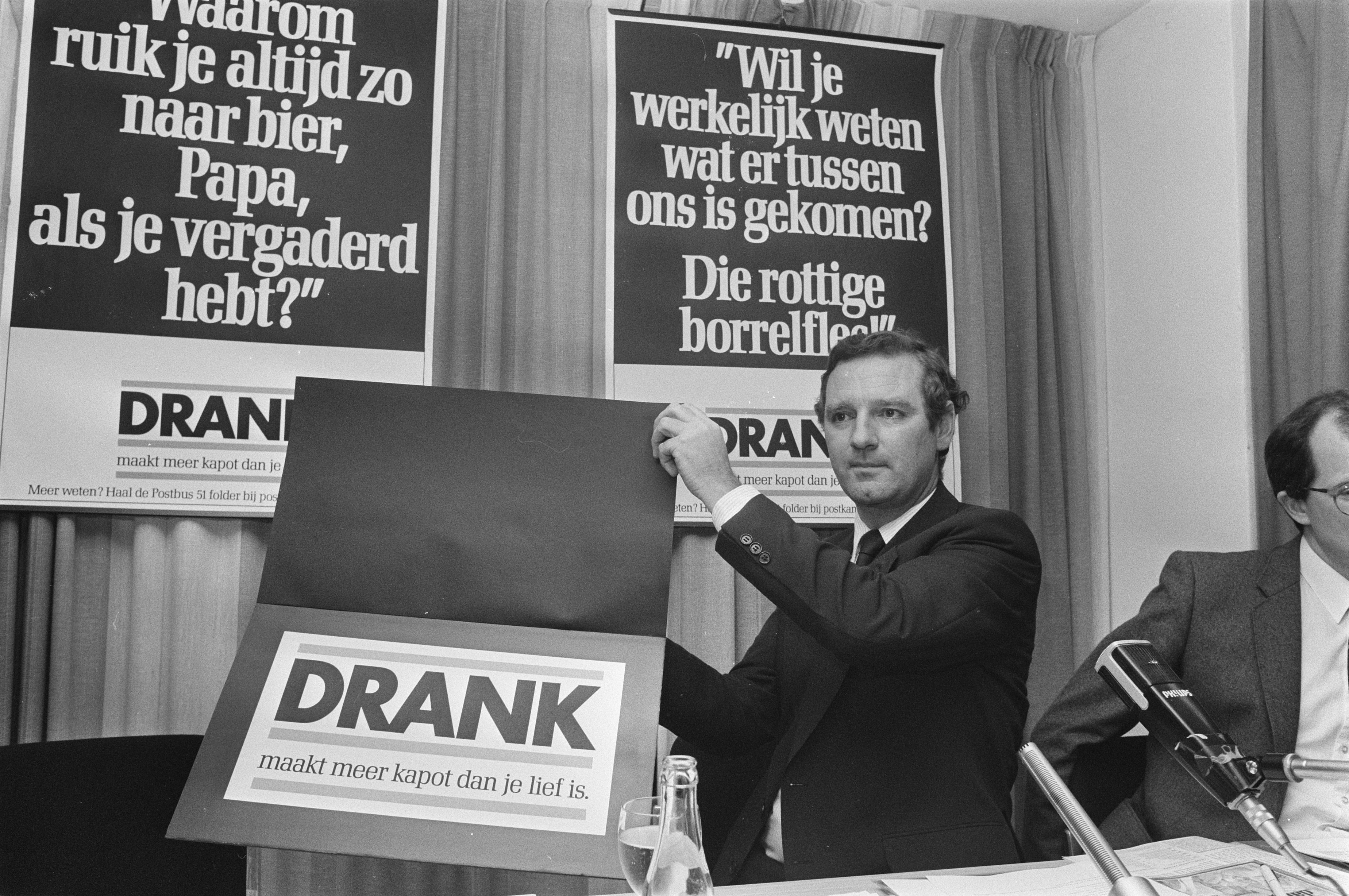 Collectie / Archief : Fotocollectie Anefo Reportage / Serie : [ onbekend ] Beschrijving : Staatssecretaris Dees van WVC presenteert motto-campagne tegen alcoholmisbruik in Den Haag Datum : 4 september 1986 Locatie : Den Haag, Zuid-Holland Trefwoorden : CAMPAGNES Persoonsnaam : Dees, Dick Fotograaf : Bogaerts, Rob / Anefo Auteursrechthebbende : Nationaal Archief Materiaalsoort : Negatief (zwart/wit) Nummer archiefinventaris : bekijk toegang 2.24.01.05 Bestanddeelnummer : 933-7493